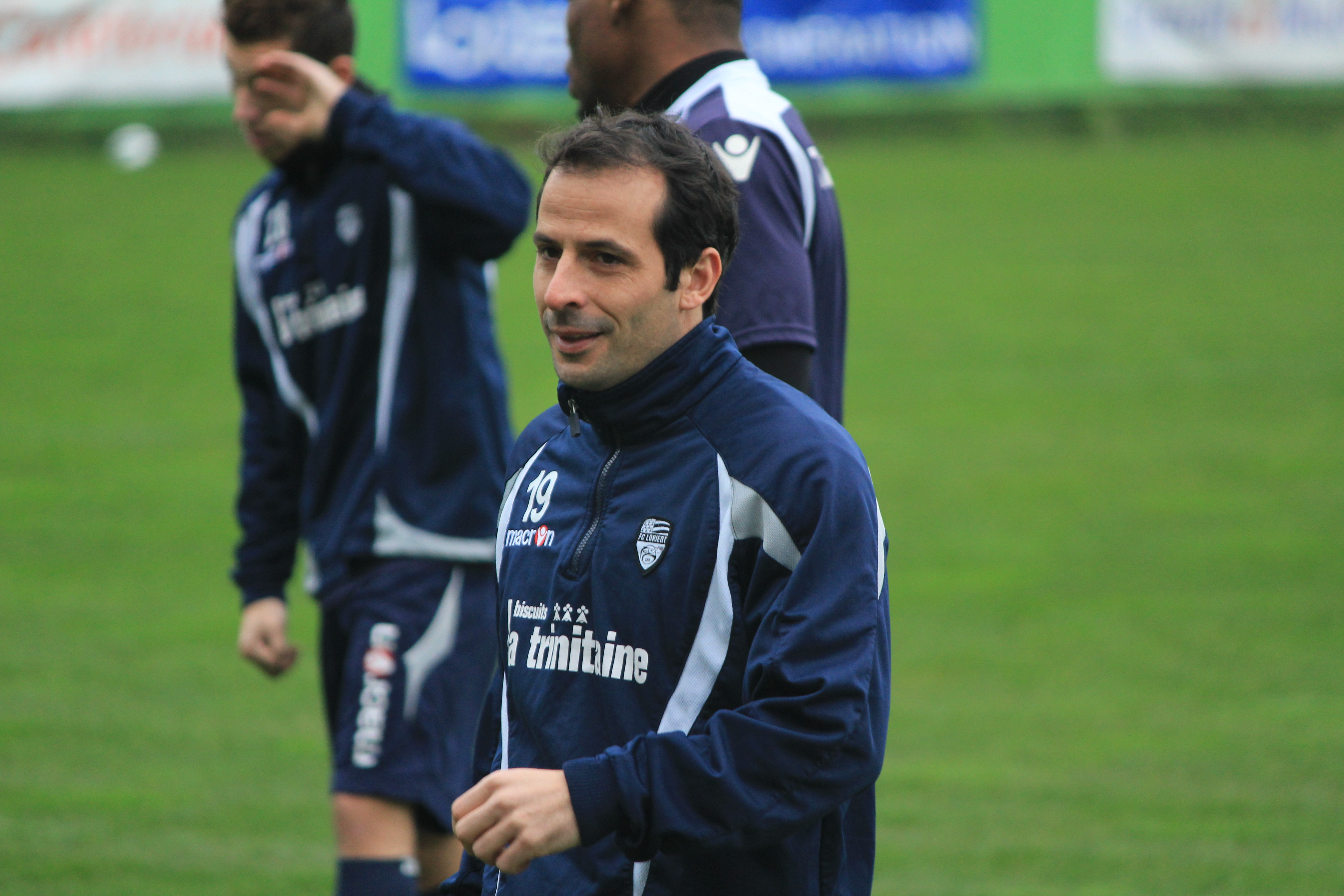 Ludovic Giuly pendant un entrainement du FC Lorient le 3 janvier 2012